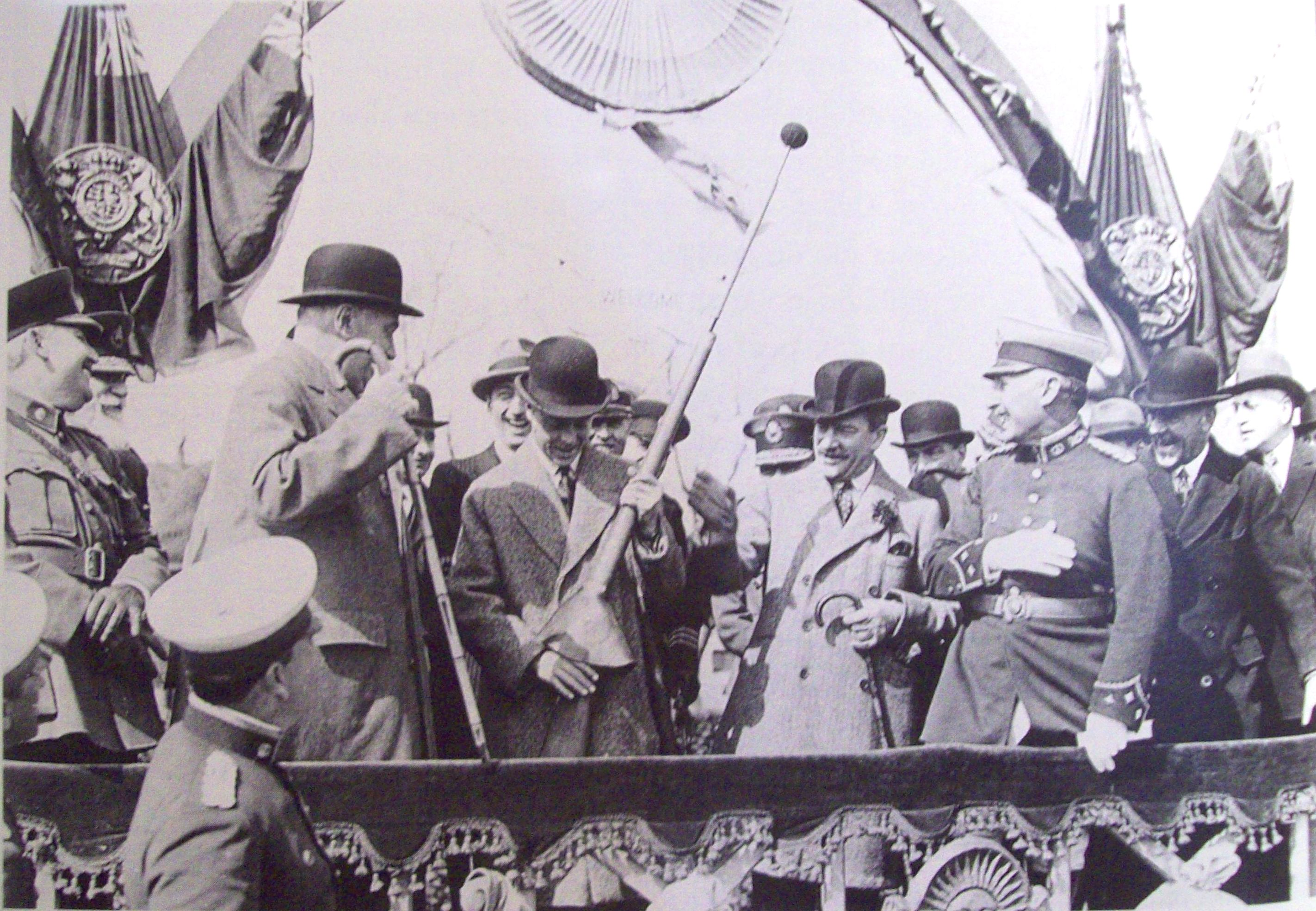 Es una foto del Presidente de Argentina Marcelo Torcuato de Alvear, junto al príncipe de Gales, foto del año 1925.